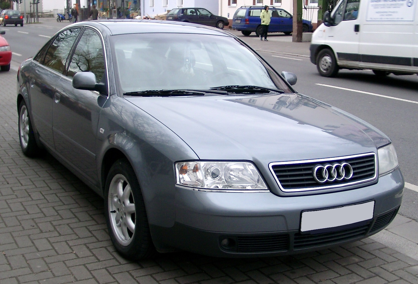 Audi A6 C5